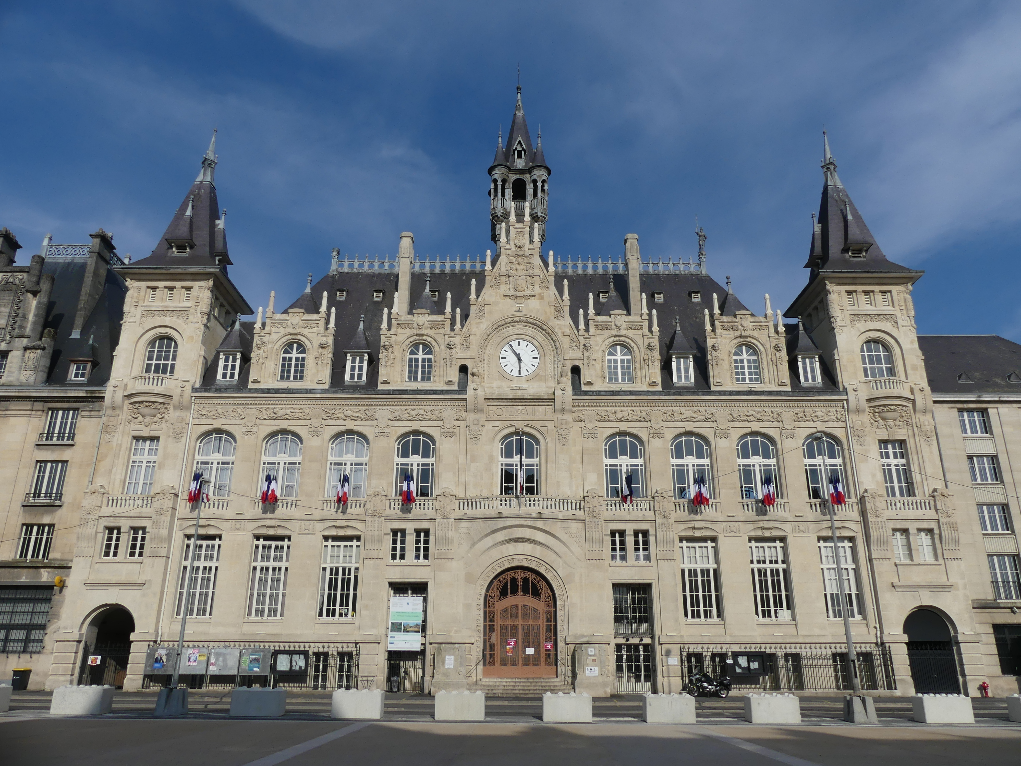 Hôtel de ville de Mézières (Charleville-Mézières) après sa rénovation, photo prise en avril 2020